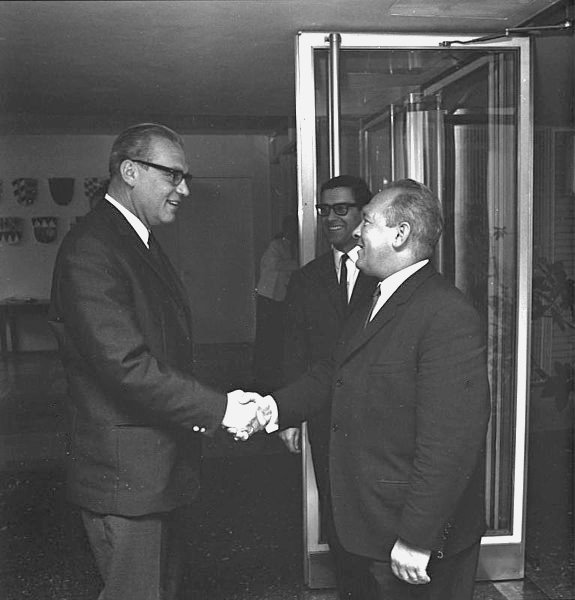 Staatsmin. Heubl, Bayer. Landesvertretung, empfängt die Fußballmannschaft Bayern-München (Europa-Cup-Sieger)